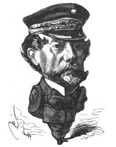 Portrait satirique de Louis Pierre Alexis Pothuau.